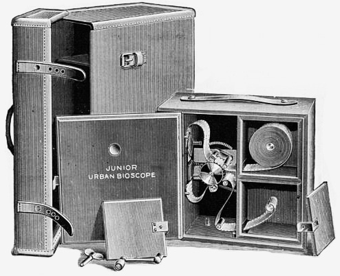 Caméra Junior Urban Bioscope 35 mm (1902) et sa sacoche. Conçue par le Britannique Charles Urban. Son couvercle est ouvert.